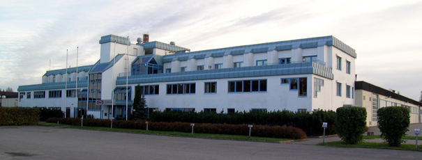 Maarud fabrikker, part of Kraft Foods, Disenå, Sør-Odal, Hedmark, Norway.